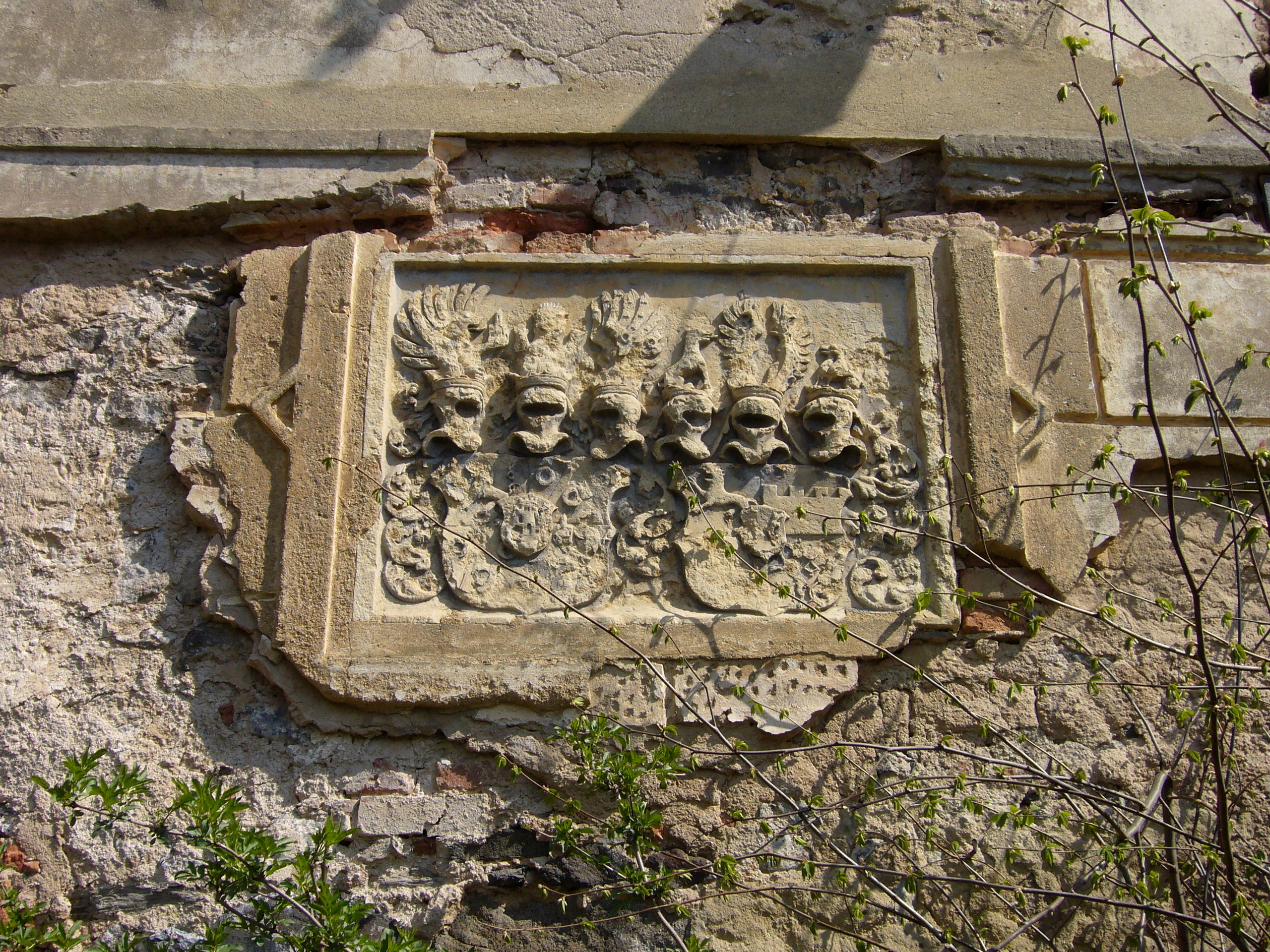 Vintířov - starý zámek (erby na fasádě)